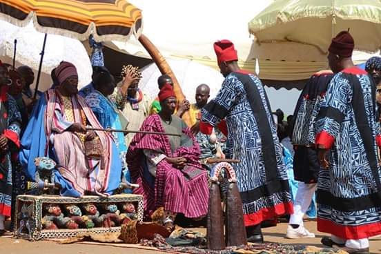 Pendant le Shömelueu